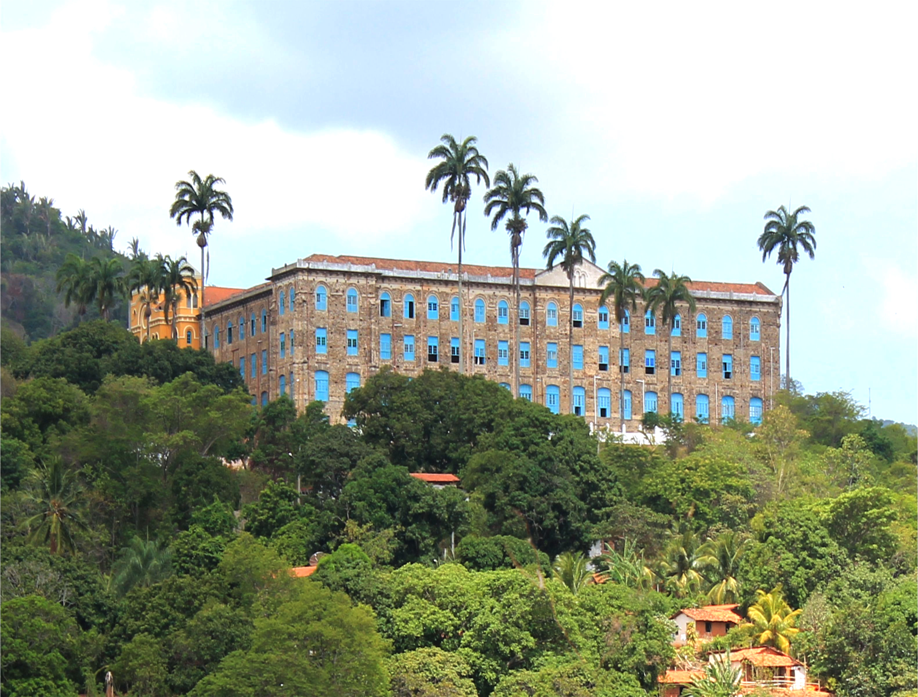 Construído em 1922, inaugurada em 20 de Agosto de 1927. É uma construção de estilo Medieval.